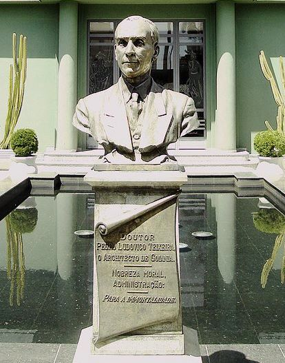 Busto de Pedro Ludovico Teixeira, à frente do Palácio das Esmeraldas, em Goiânia, Brasil.